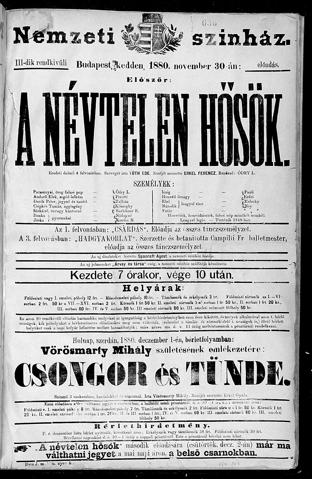 A Névtelen hősök ősbemutatójának plakátja.